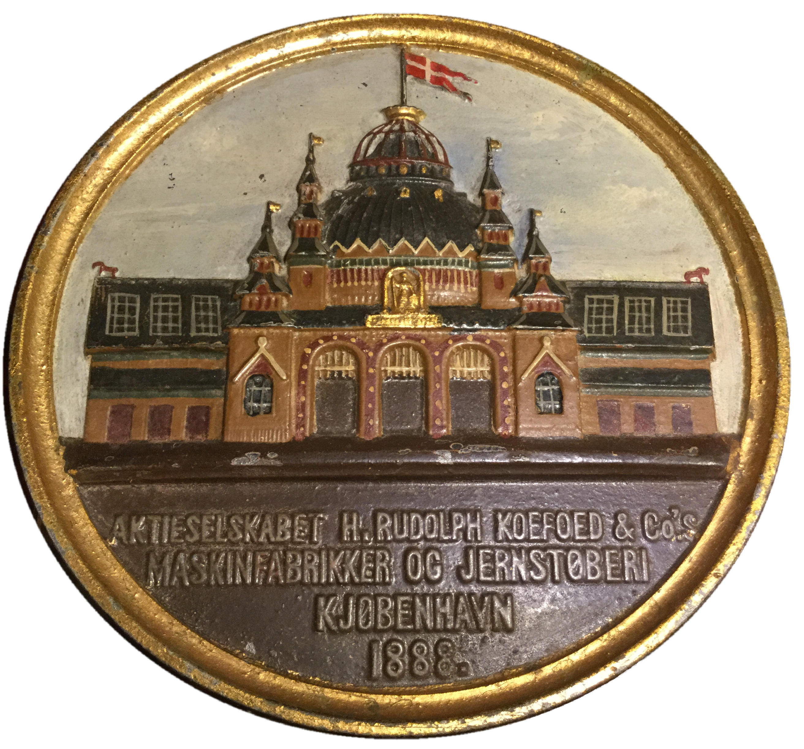 Plakette i malet støbejern med reklametekst om Aktieselskabet H. Rudolph Koefoed og Co Maskinfabrikker og Jernstøberi Kjøbenhavn 1888. Bygningen på plaketten er fra “Den Nordiske Industri-, Landbrugs- og Kunstudstilling i København 1888” og findes desværre ikke mere. I dag ligger det nuværende Københavns rådhus på stedet.